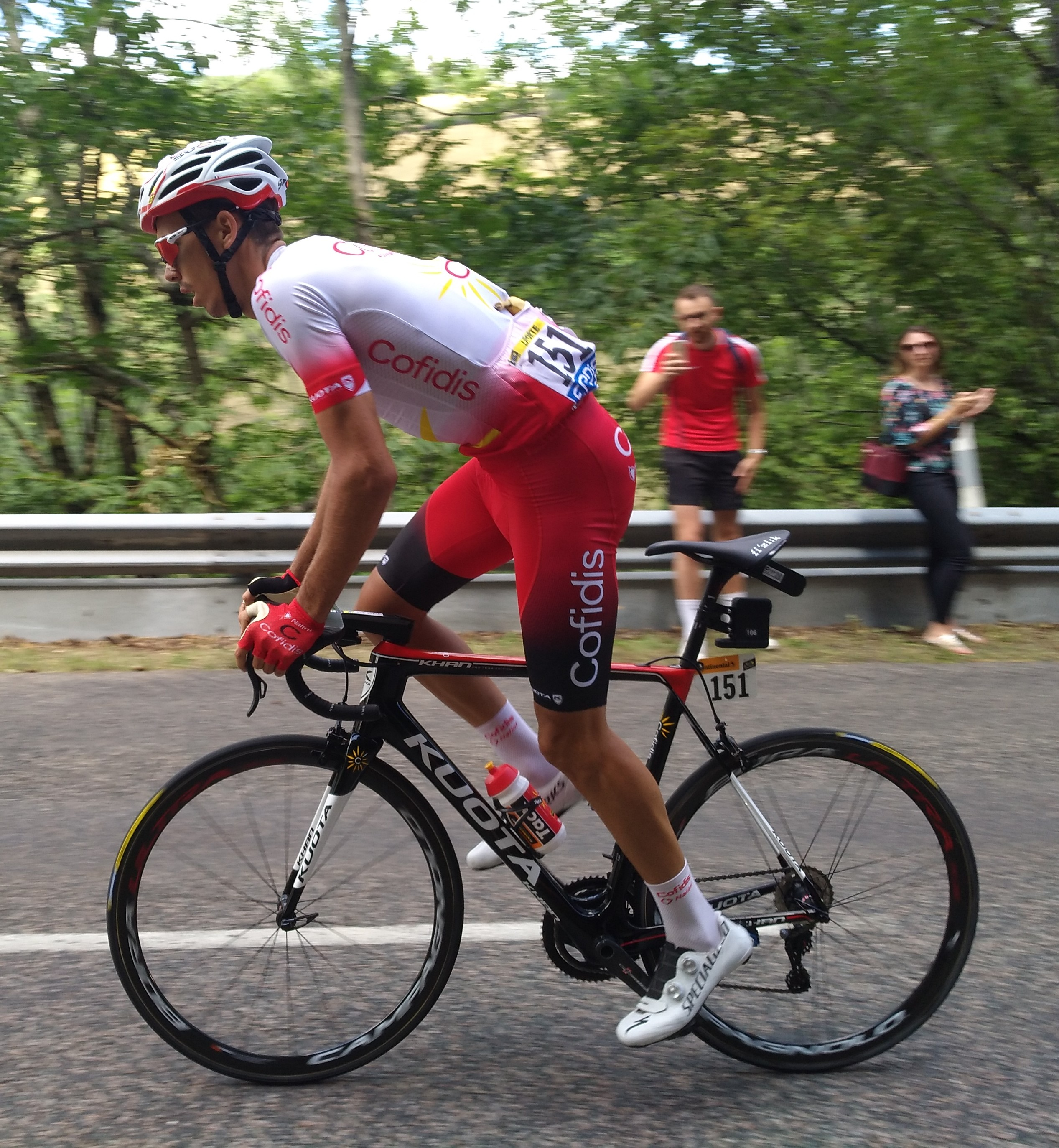 Christophe Larpote ans le col de la Croix-Paquet, lors de la 8e étape du Tour de France 2019.